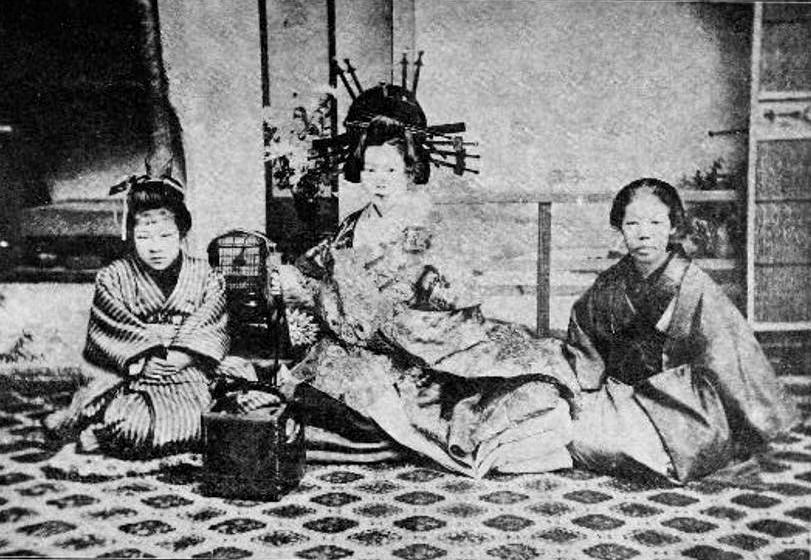 明治時代の花魁。遣り手と禿と。